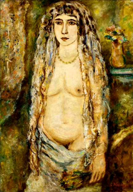 Tableau La Mariée juive, de Léon Weissberg